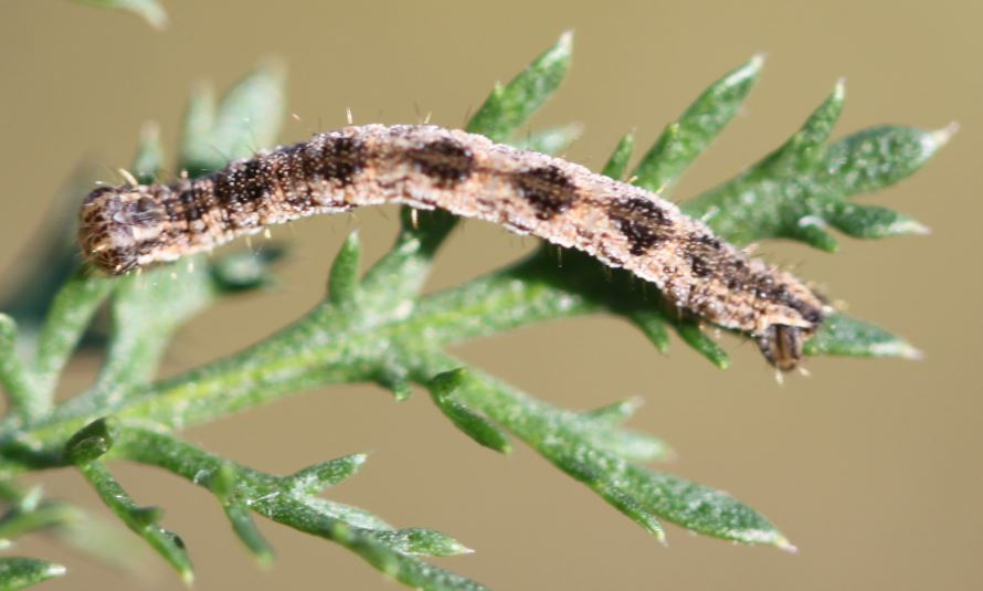 Raupe des Schafgarben-Blütenspanner (Eupithecia icterata) am 17.10.2017 in der Schwetzinger Hardt